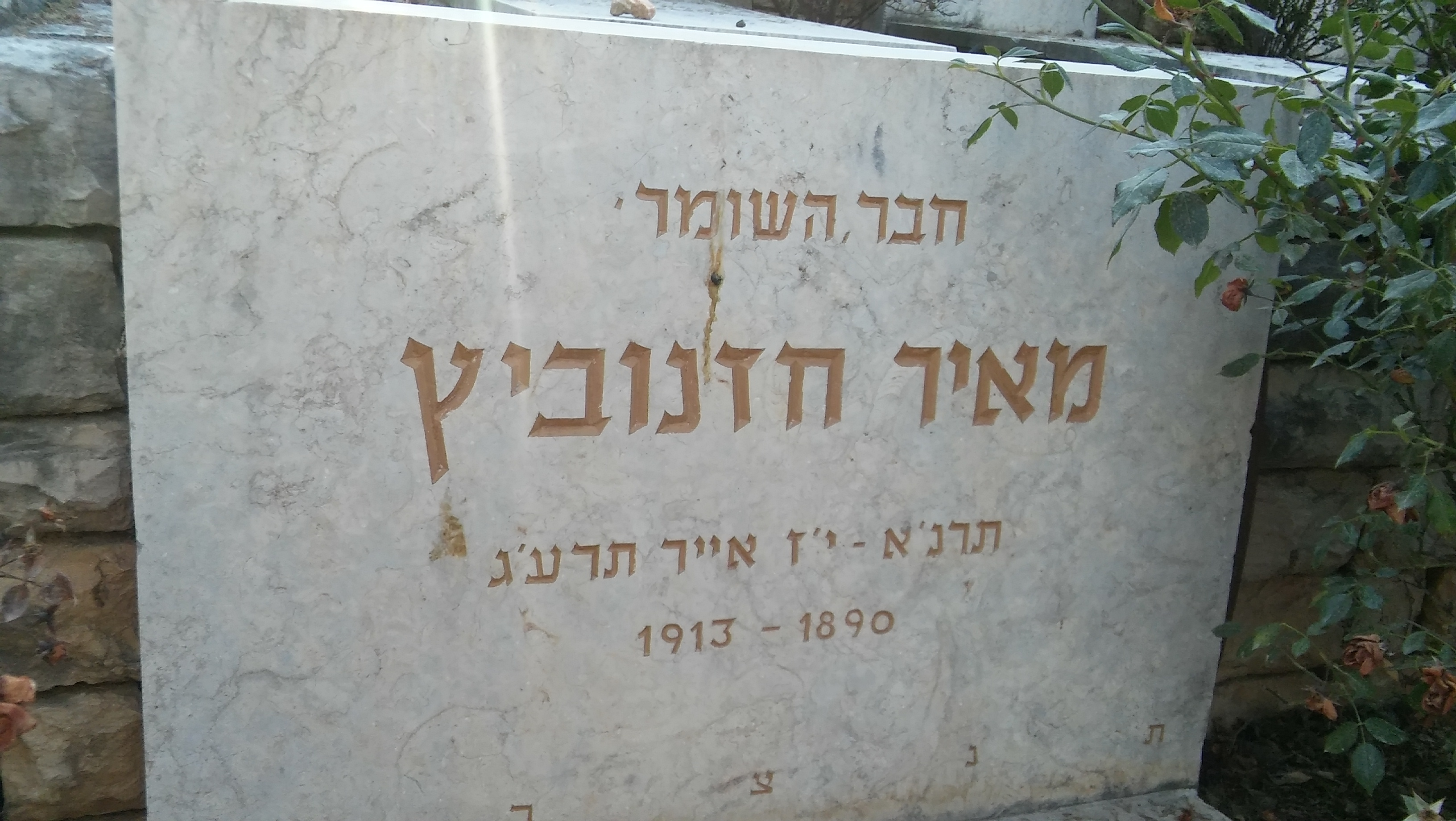 קברו של מאיר חזנוביץ' בחלקת השומר בבית הקברות של כפר גלעדי